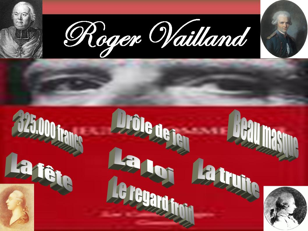 Illustration du thème "Romans"